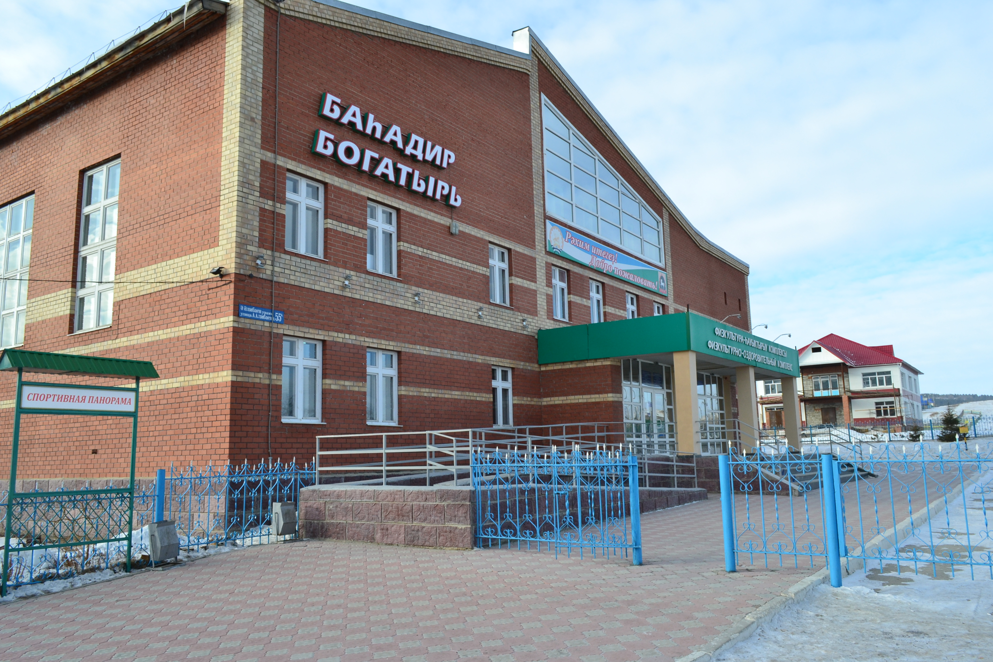 ФОК Богатырь (Баймакский район)